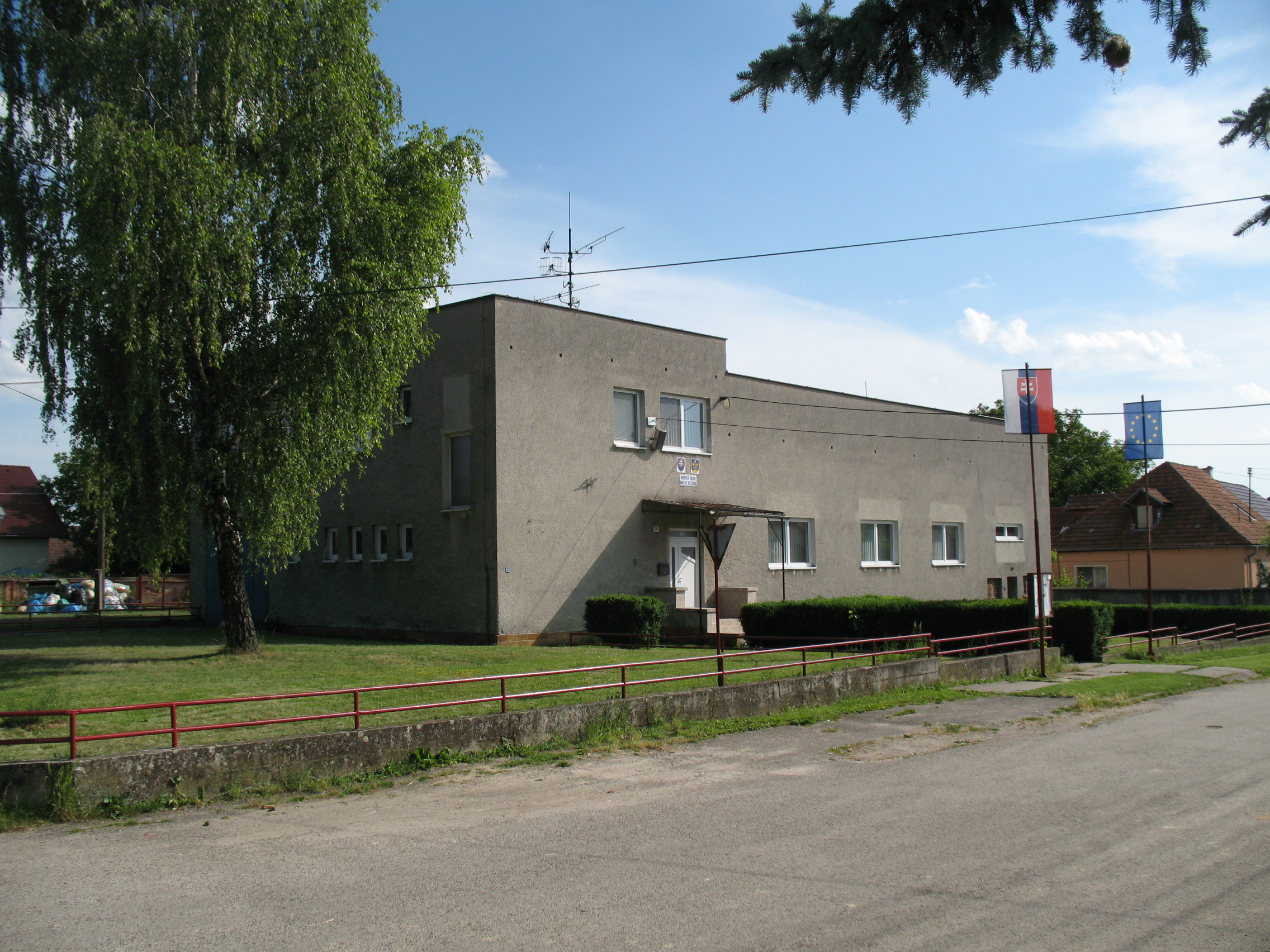 Alsóneszte